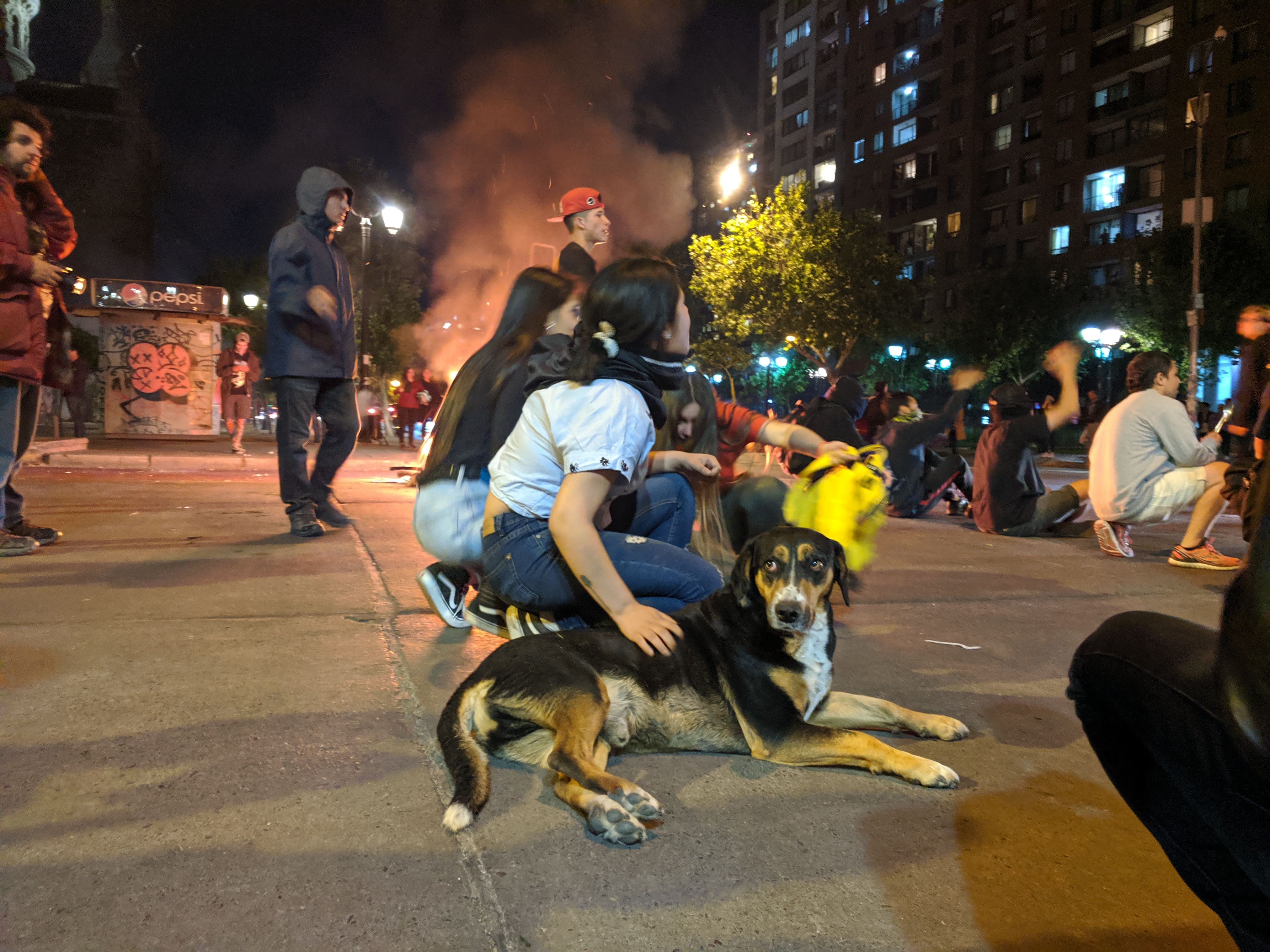 Protestas en Santiago de Chile desatadas por el alza del transporte público.